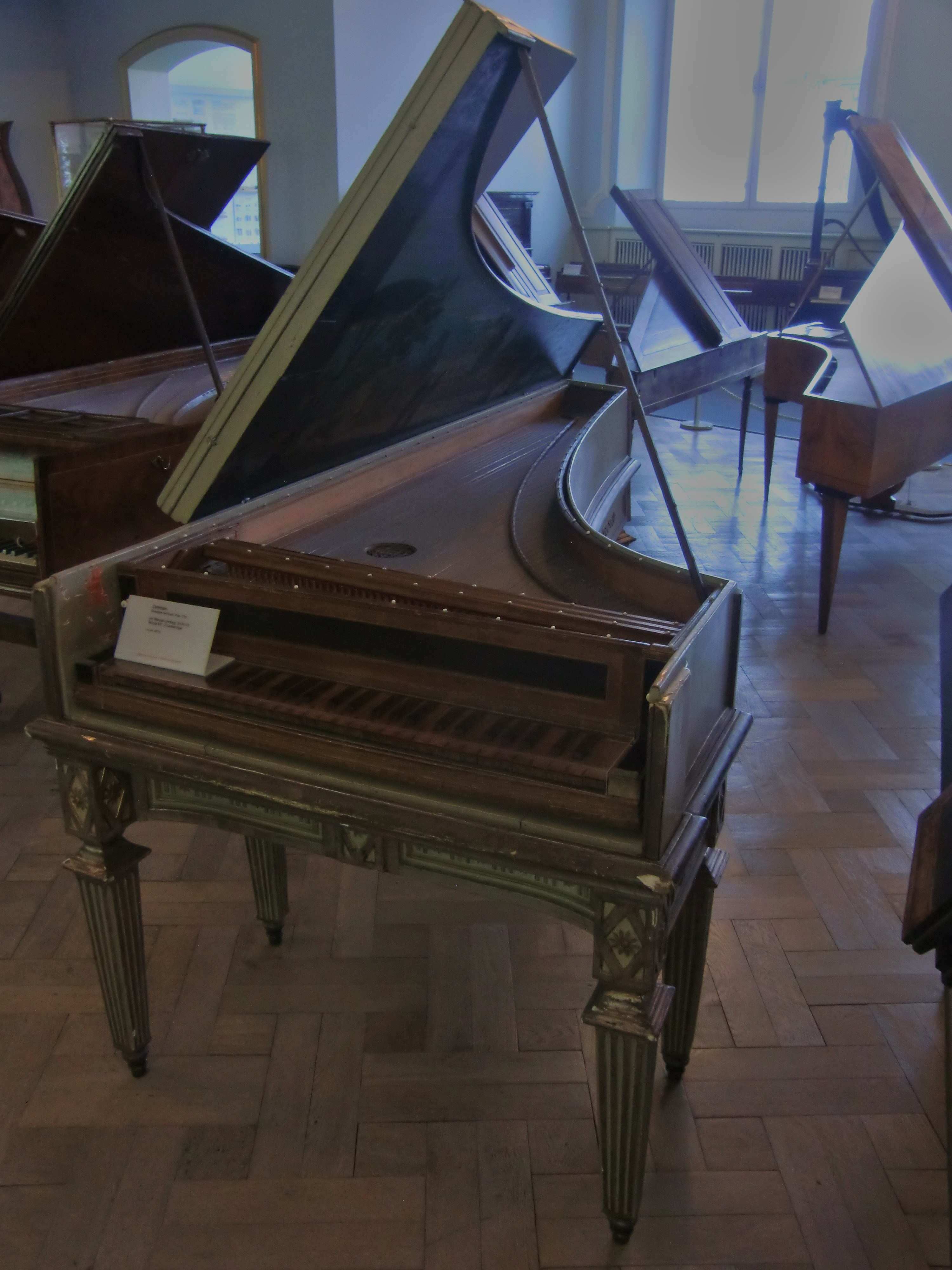 Clavecin de Giuseppe Solfanelli (Pise, 1729) - Munich, Deutsches Museum